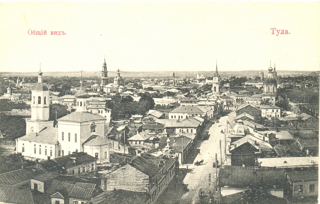 Пятницкая улица